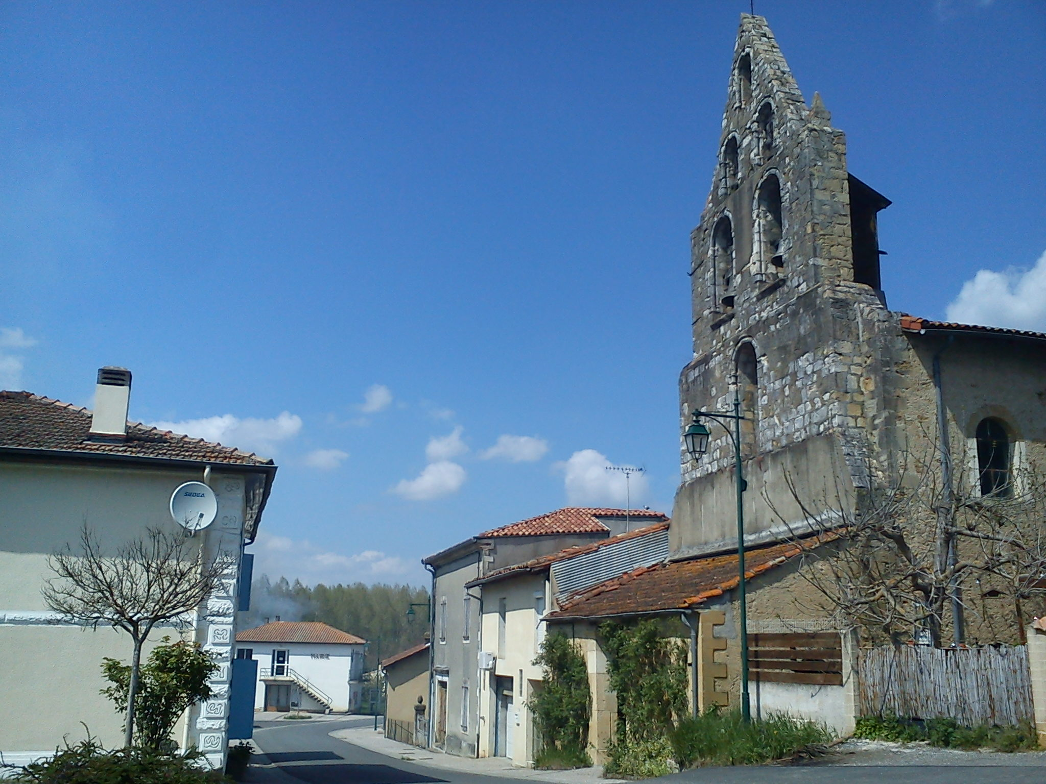 Terrebasse